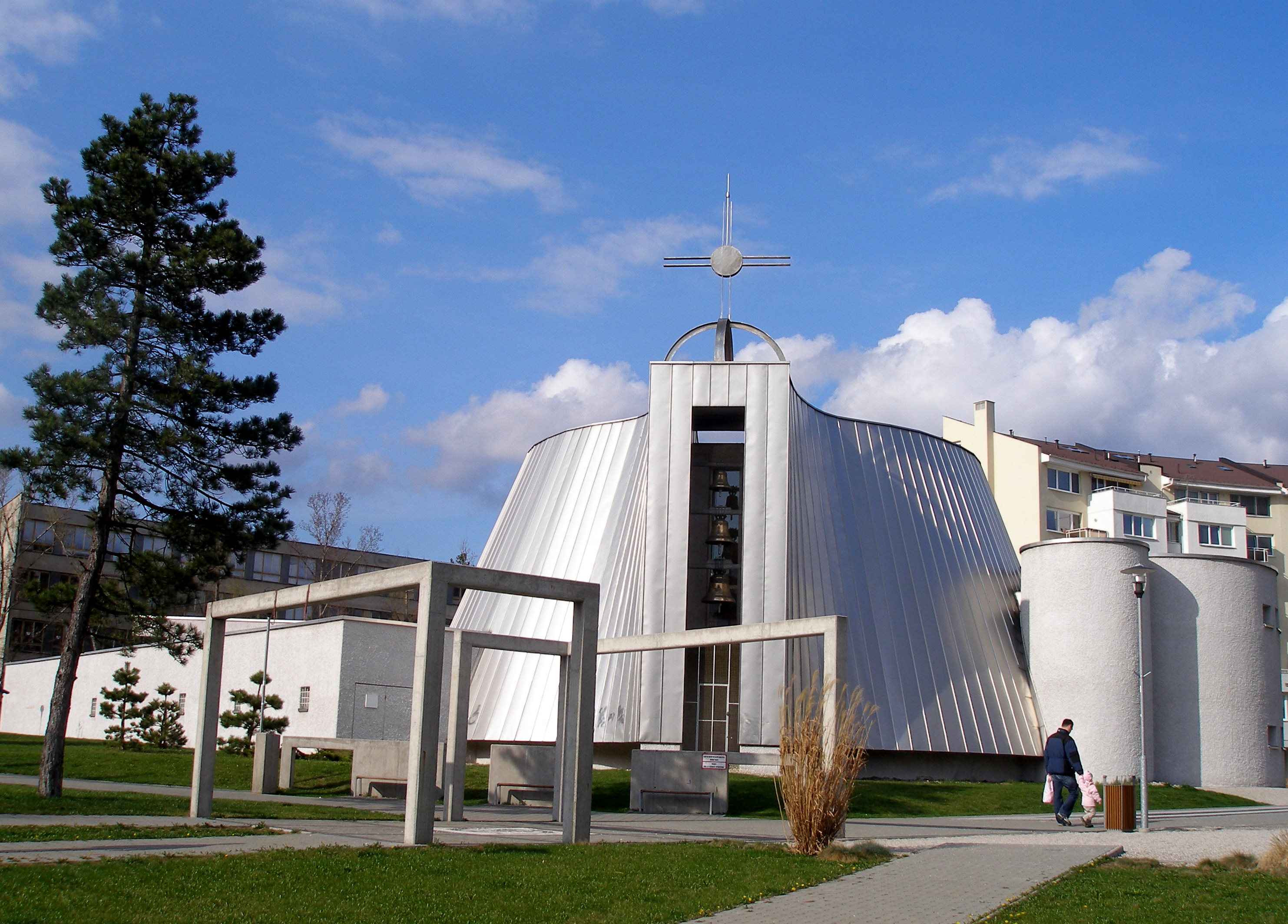 Bratislava mestská časť Karlova Ves.